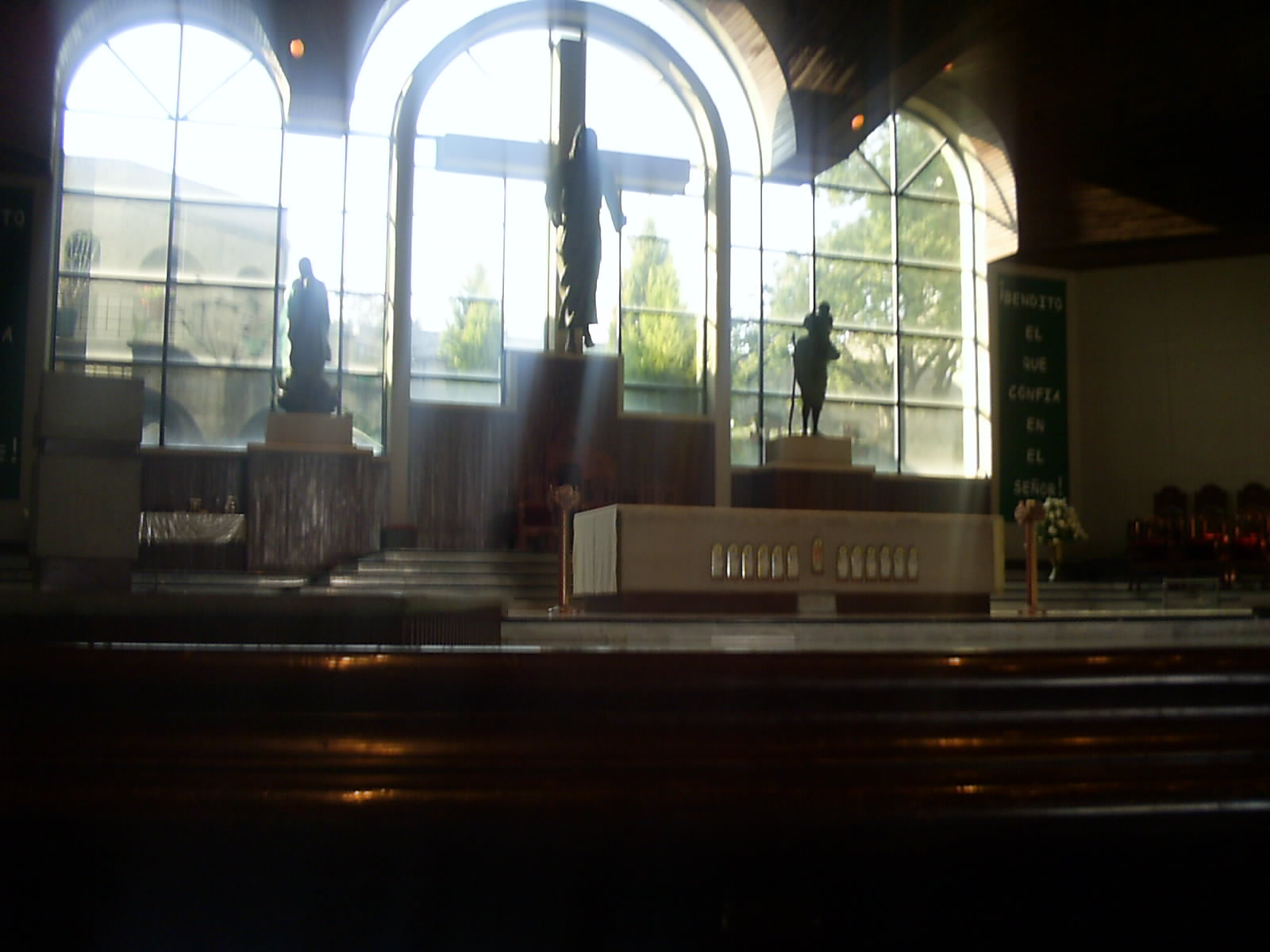 Interior de la Catedral de Ecatepec